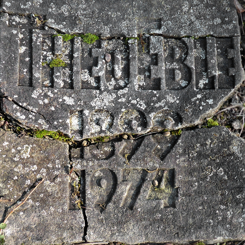 Theo Eble (1899–1974) Künstler, Maler, Grafiker, Glasmalerei, Fresko, Gab auf dem Friedhof Hörnli, Riehen, Basel-Stad